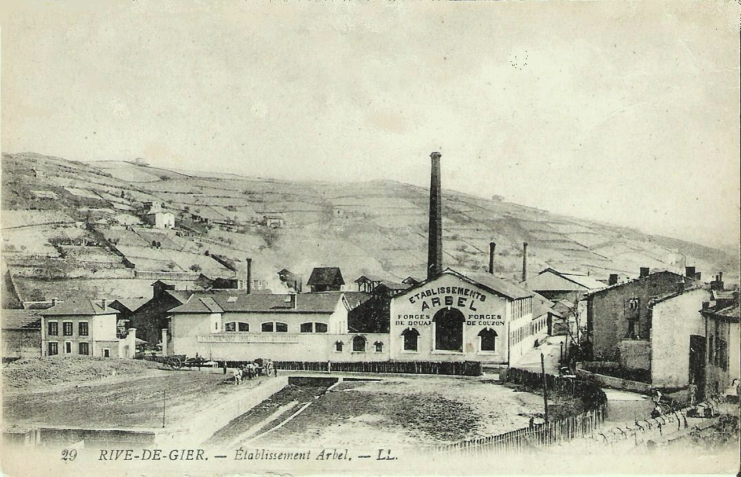 Rive-de-Gier.-Etablissement Arbel